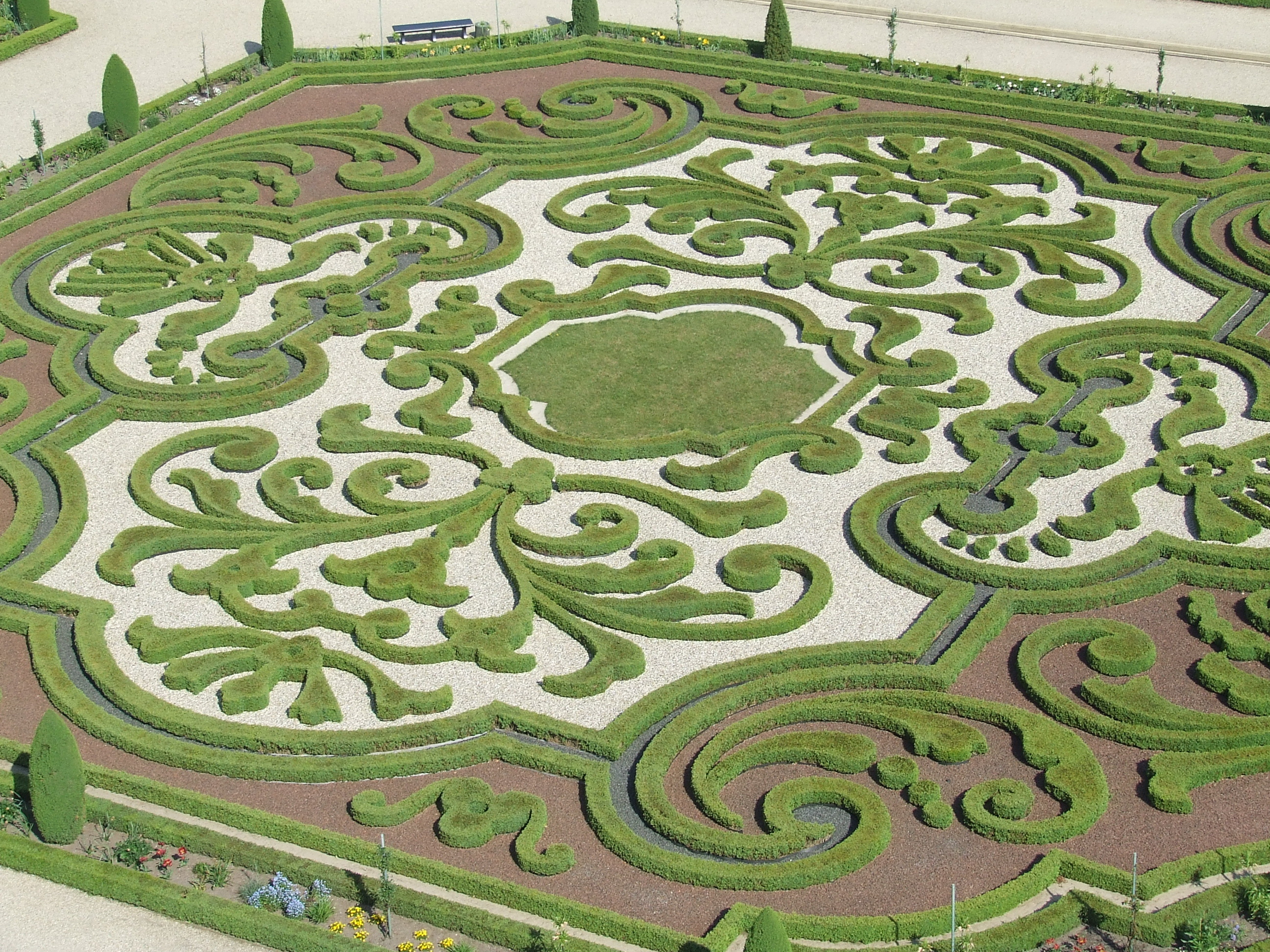 Broderieparterre in Het Loo